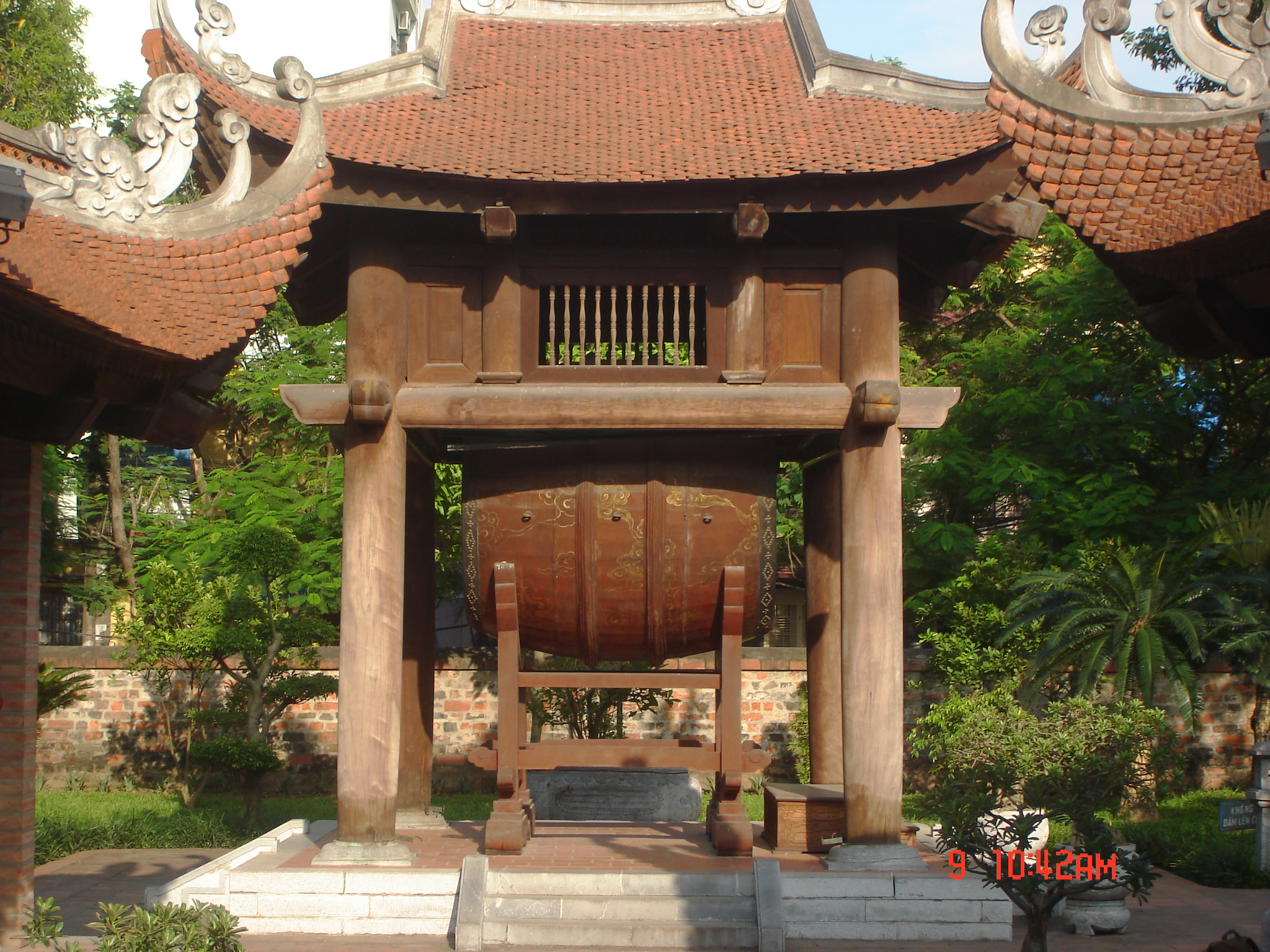 Die Große trommel, die zu den Zeremonien geschlagen wurde